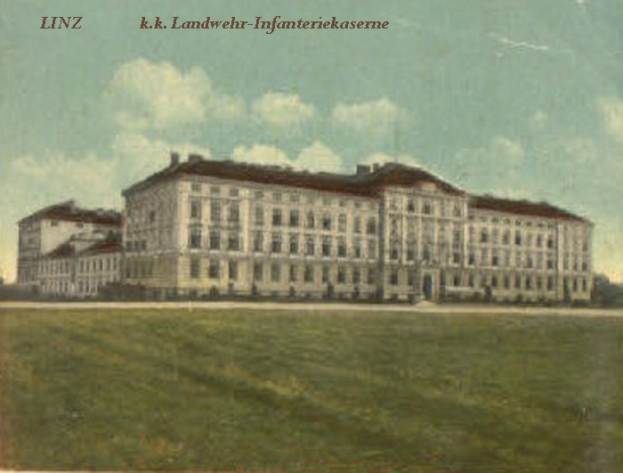 k.k. Landwehr Infanteriekaserne in Linz